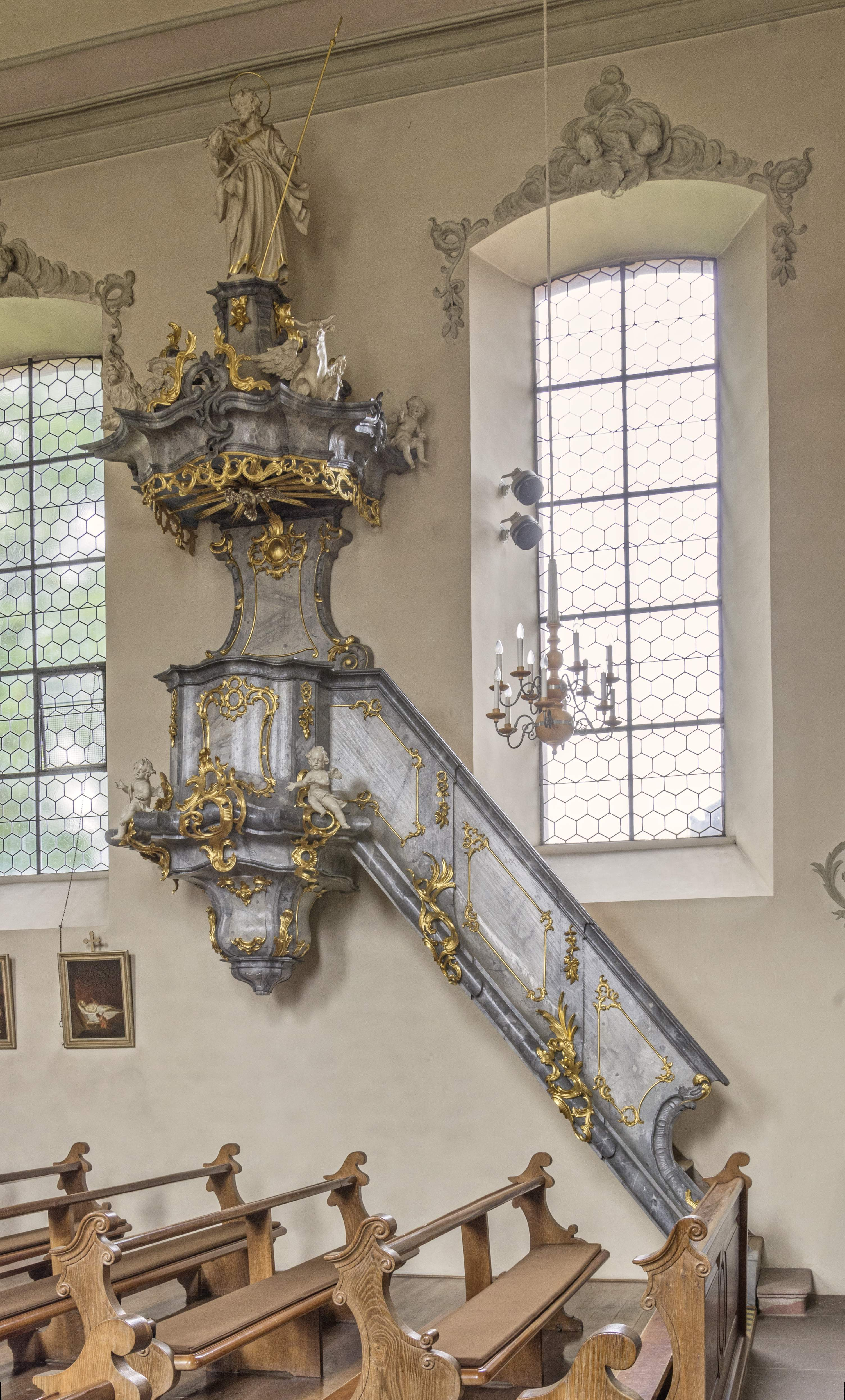 Die Katholische Pfarrkirche in March Holzhausen